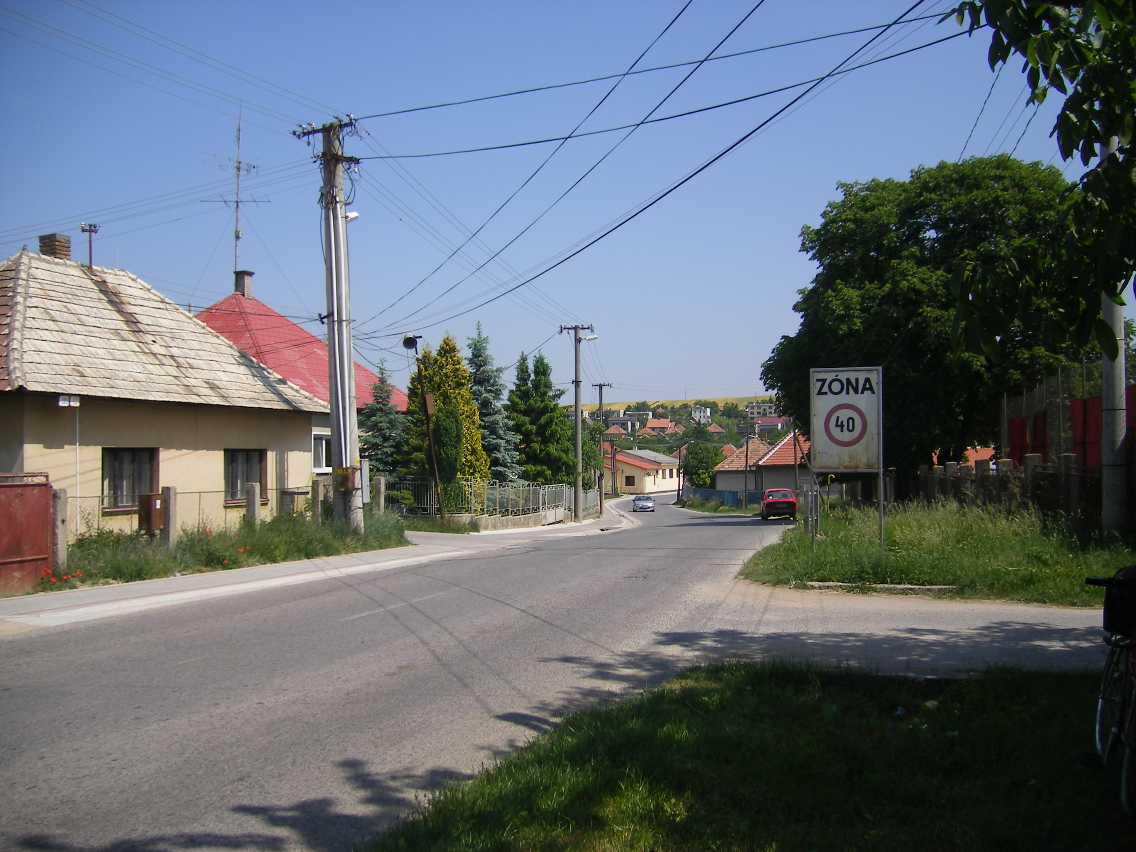 Újgyalla